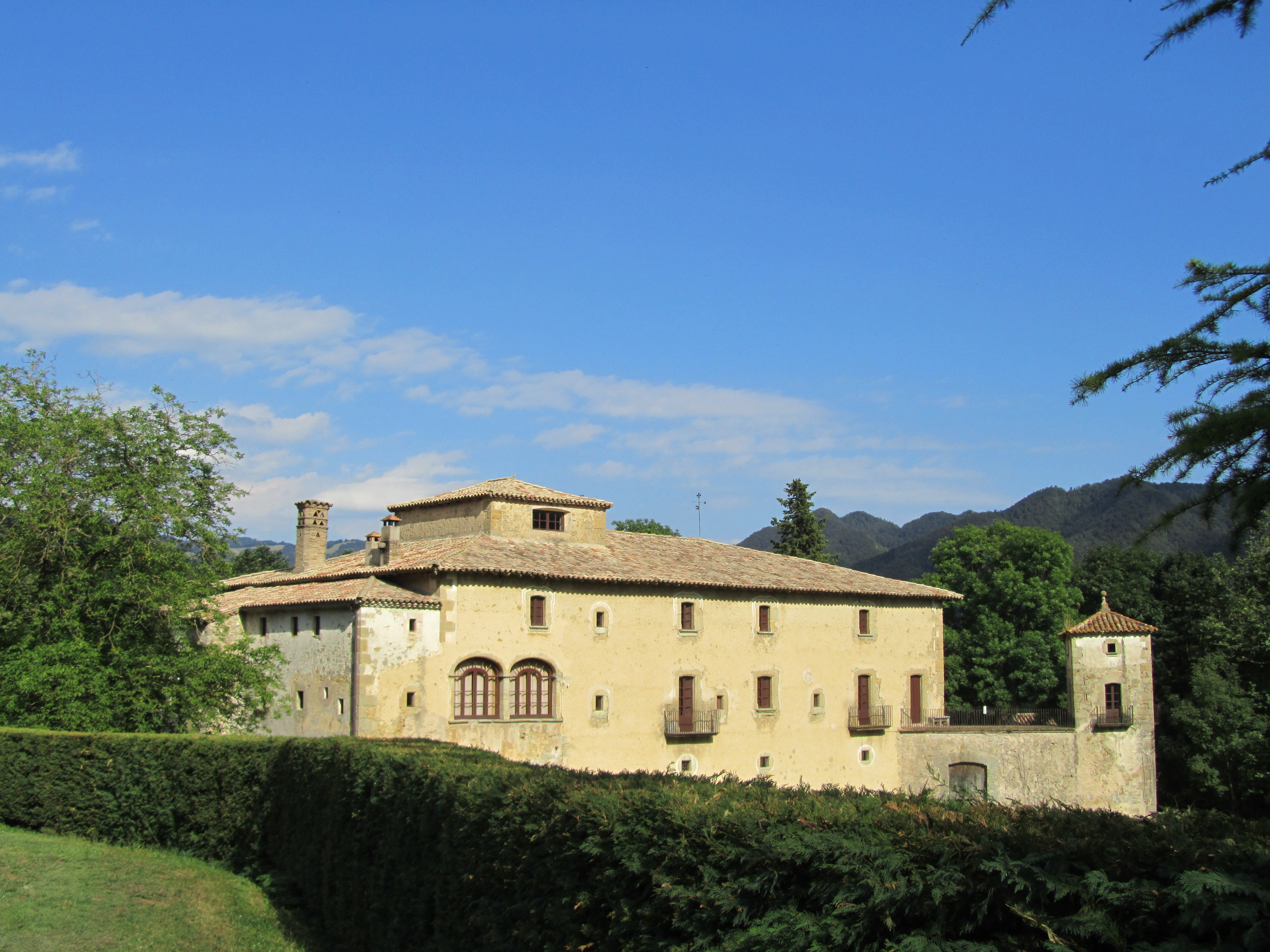 Mas el Cavaller (Vidrà)